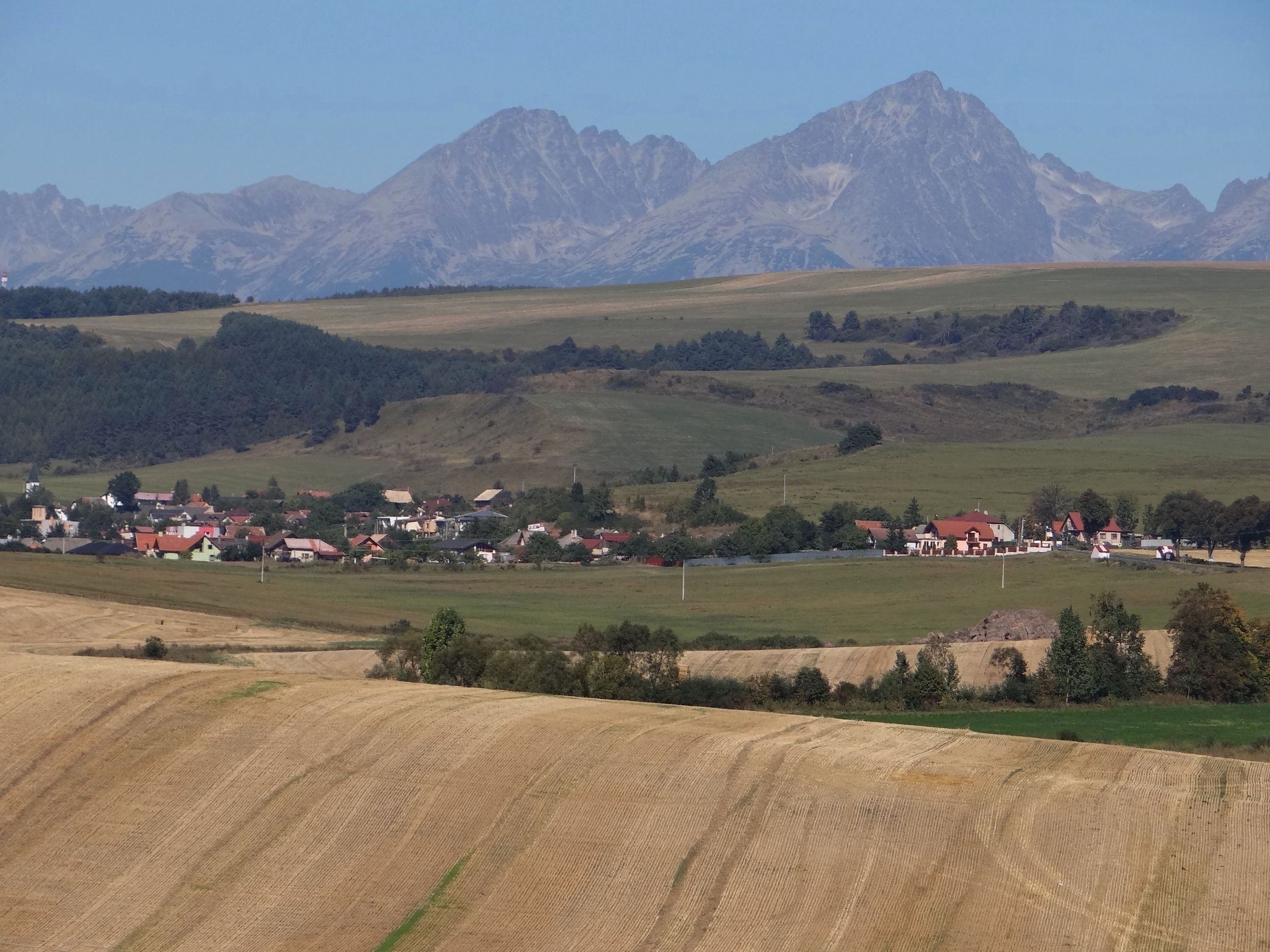 Jánovce-Mahalovce